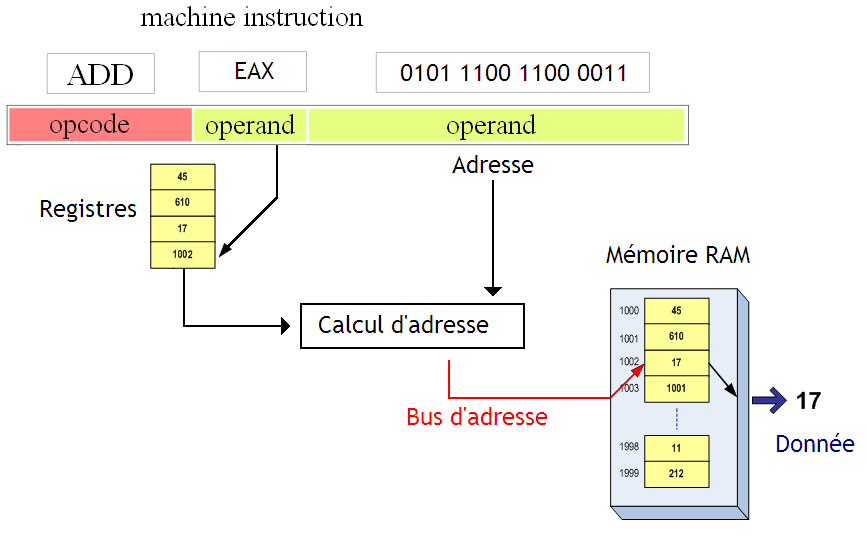 Indexed absolute